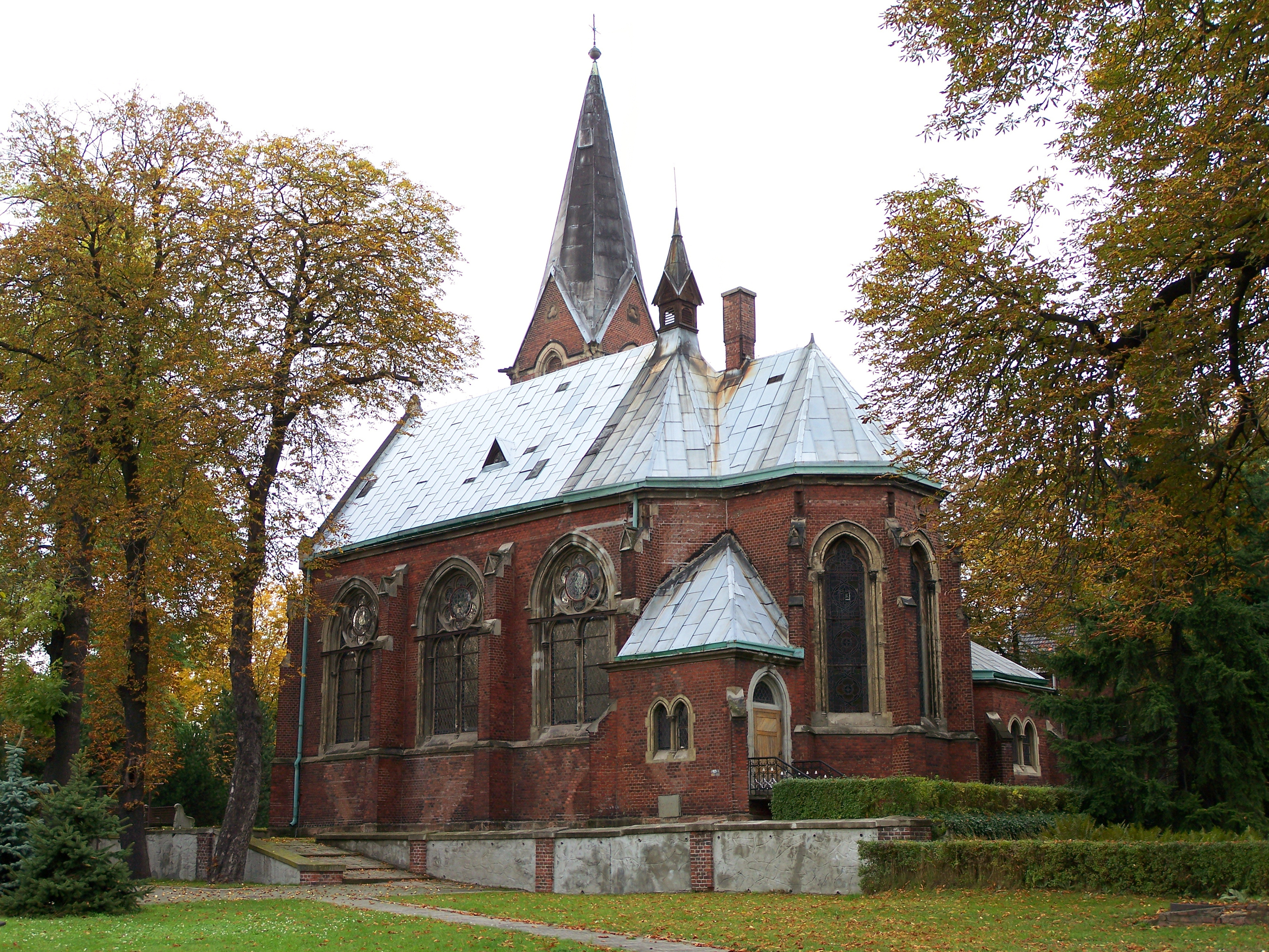 Kościół ewangelicko-augsburski w Miechowicach (dzielnica Bytomia). .